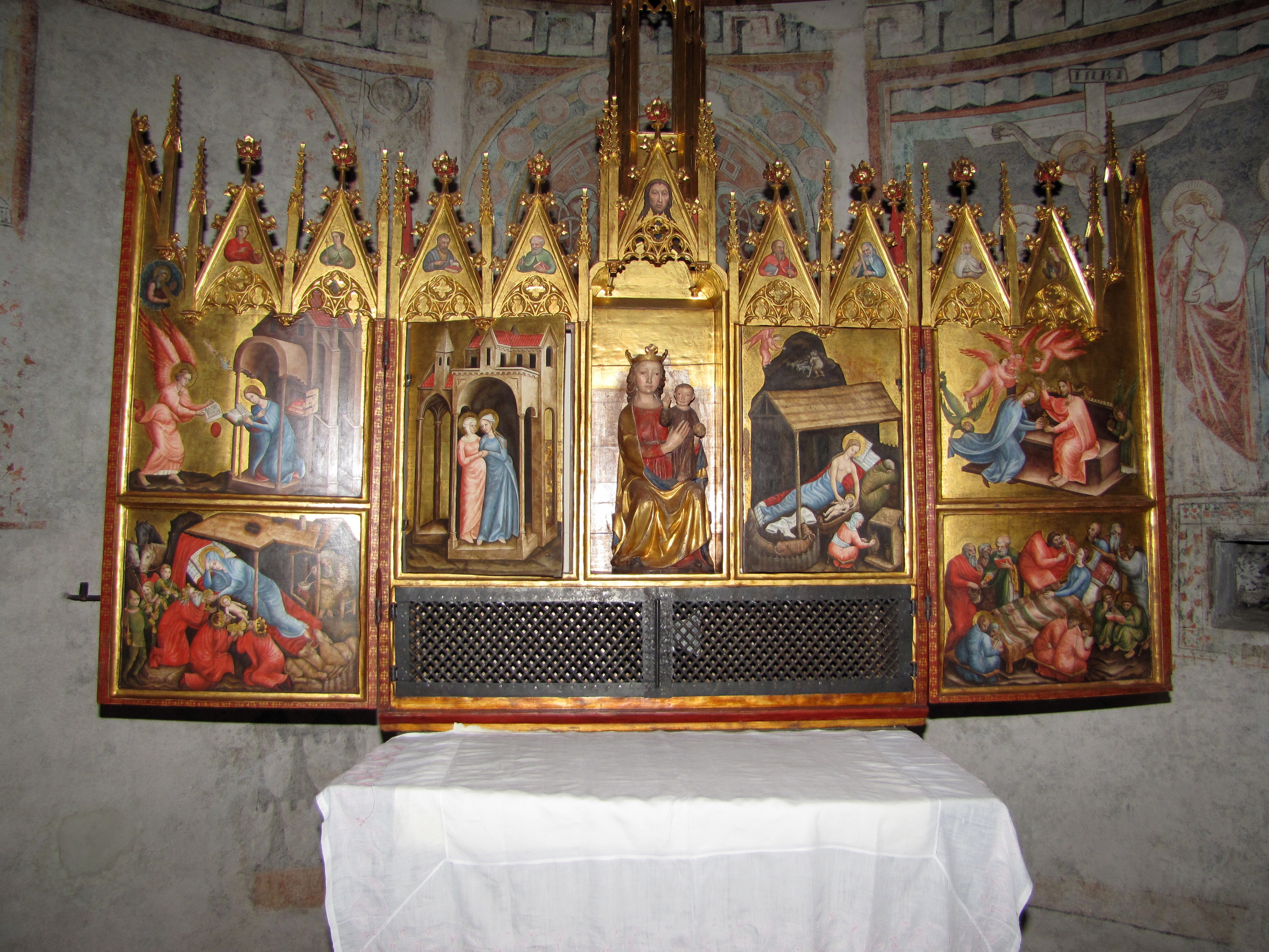 Altar von Schloss Tirol. Replikat, Original im Ferdinandeum